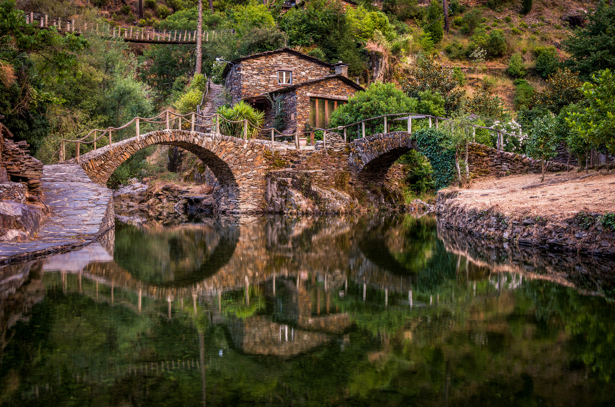 Na serra do Açor, nas proximidades da aldeia do Piódão e após percorridos 8 Km através de Estrada, encontramos Foz D´Égua em que as Ribeiras de Piódão e Chãs D´Égua, se encontram e seu percurso se trava por uma represa, criando um espelho de água e contribuindo para um local paradisíaco em pleno Verão.